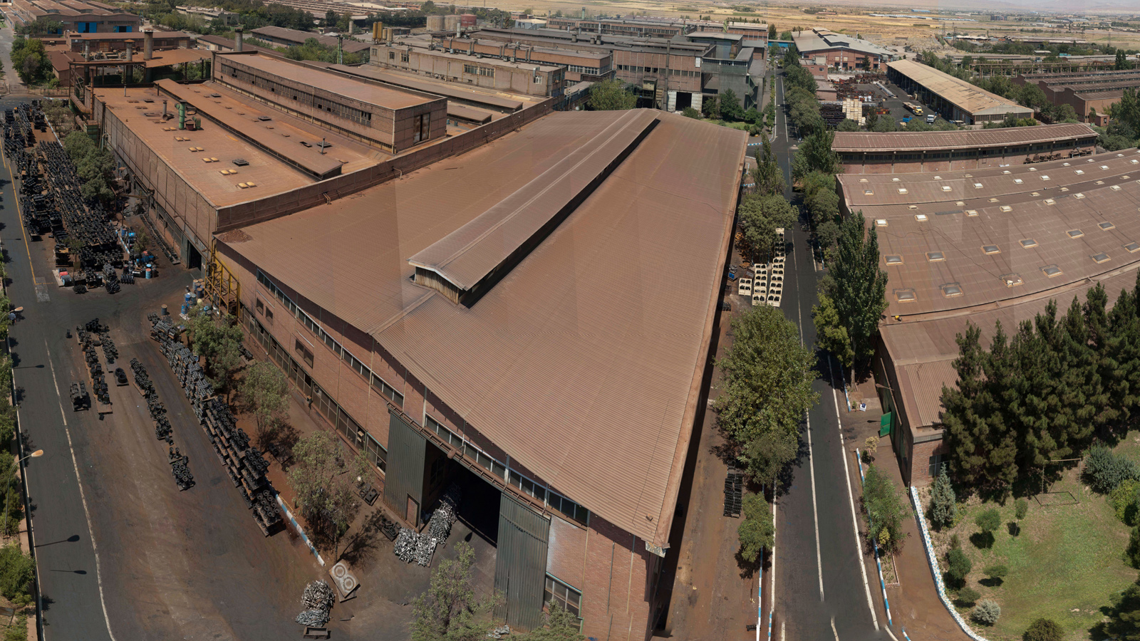 Company Overview